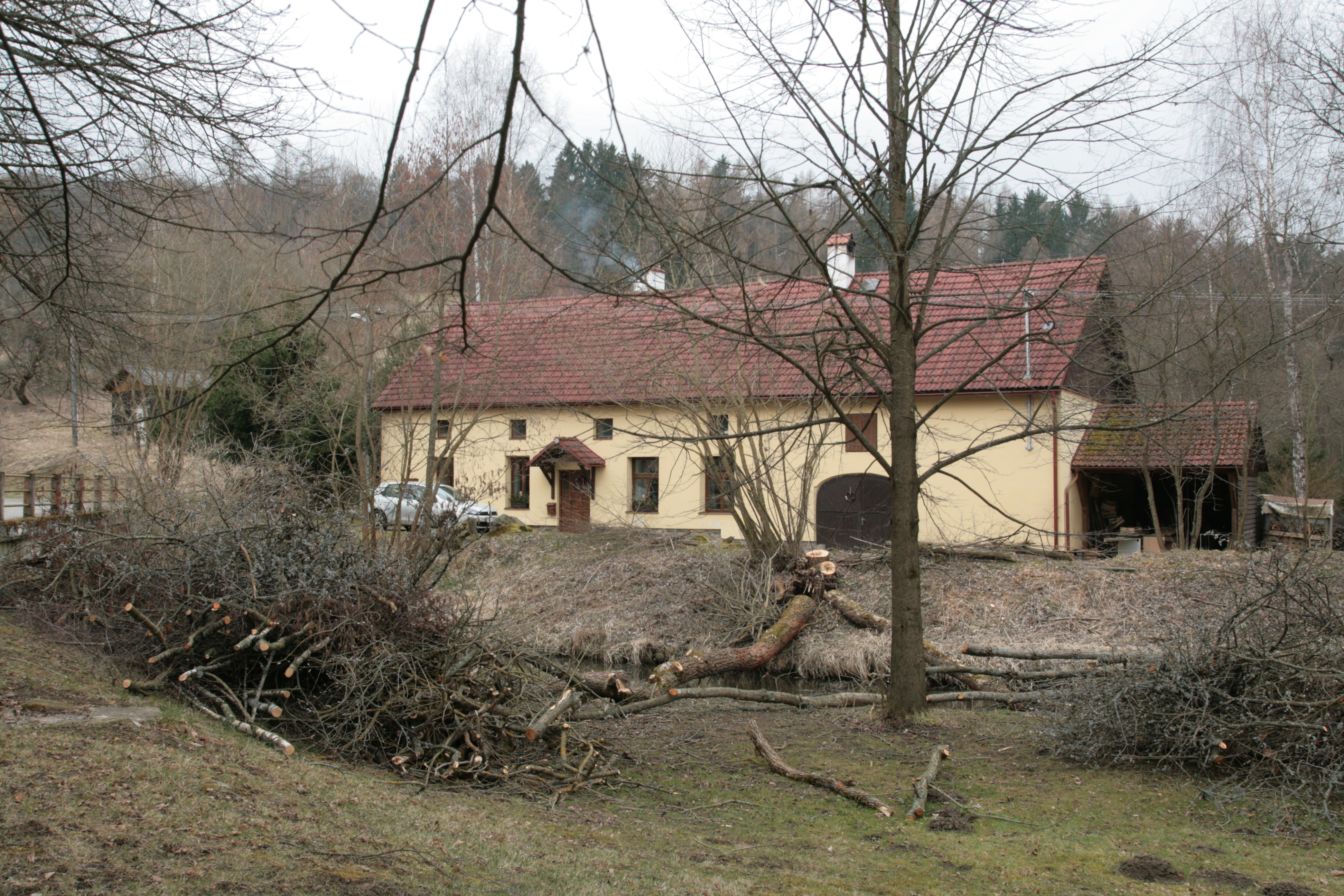 Vesnice Jaroměř, část obece Malonty v okrese Český Krumlov. Dům č. 43 u návsi, v popředí říčka Kamenice a vlevo most místní silnice.